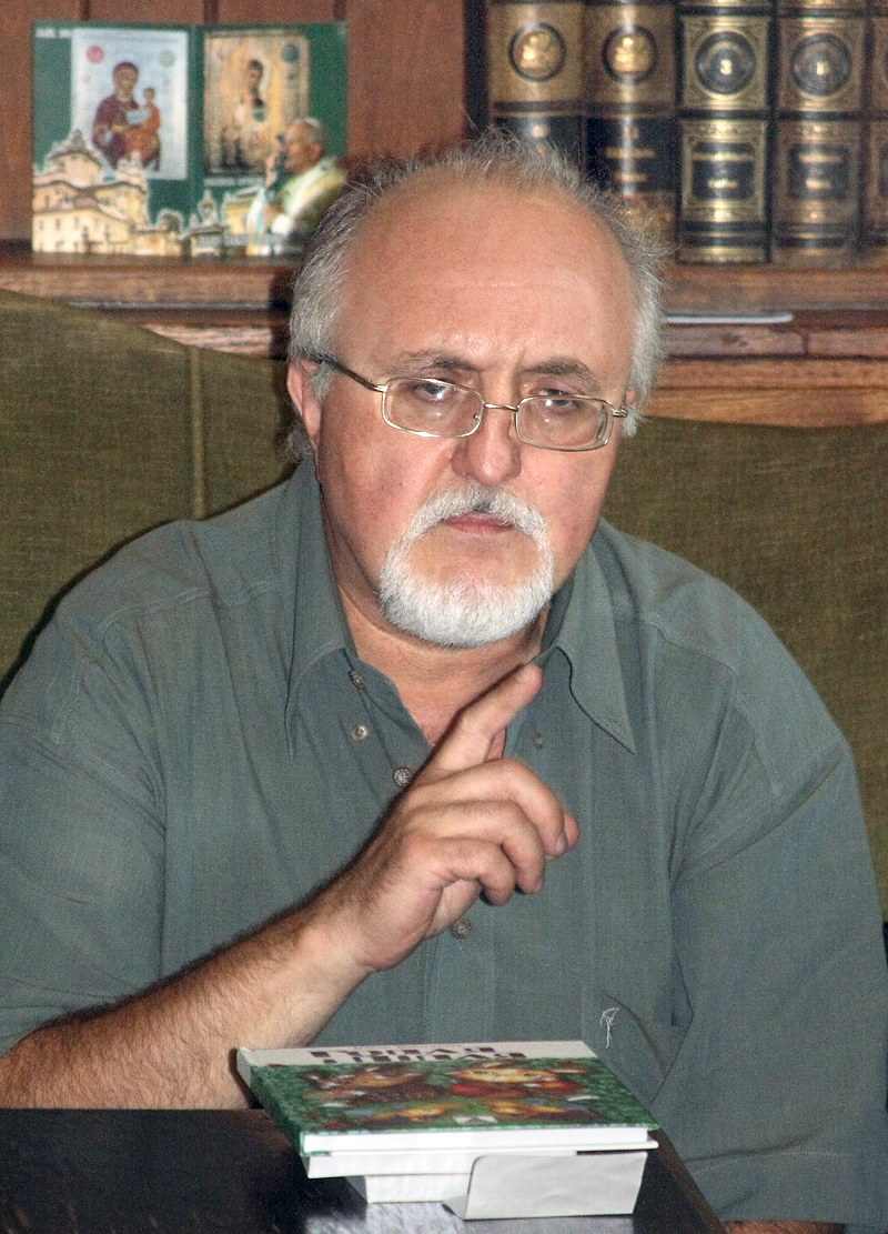 Юрий Винничук, украинский литератор